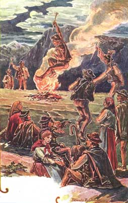 Ночь на Ивана Купала